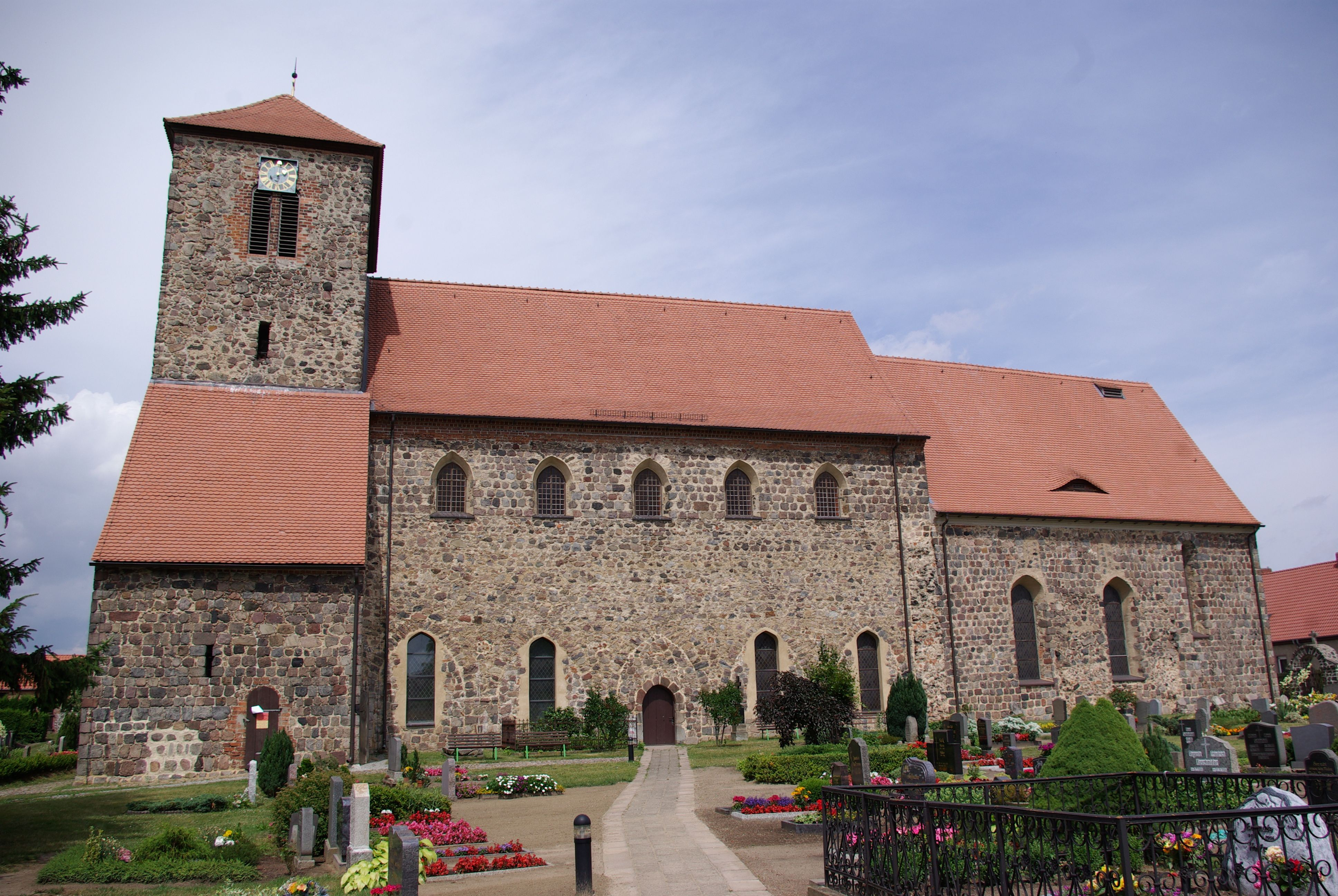 Falkenhagen (Mark), ein Ort im Landkreis Märkisch-Oderland, Brandenburg, Deutschland, die Kirche von Süden betrachtet